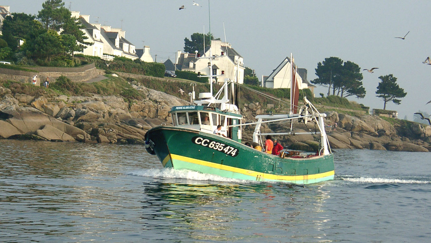 Description : Le bolincheur "Pierre Alain Atao" à l'entrée du Port de Concarneau type bateau : bolincheur année construction : 1983 Lieu : Concarneau, Bretagne, France Date : 2001? Auteur : Pline Photo personnelle Remarque : le bateau est depuis 2002 basé à Saint Guennolé et a été rebaptisé "Margritic"